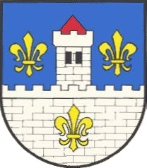 Die Wiederverleihung des Gemeindewappens erfolgte mit Wirkung vom 10. April 2016.